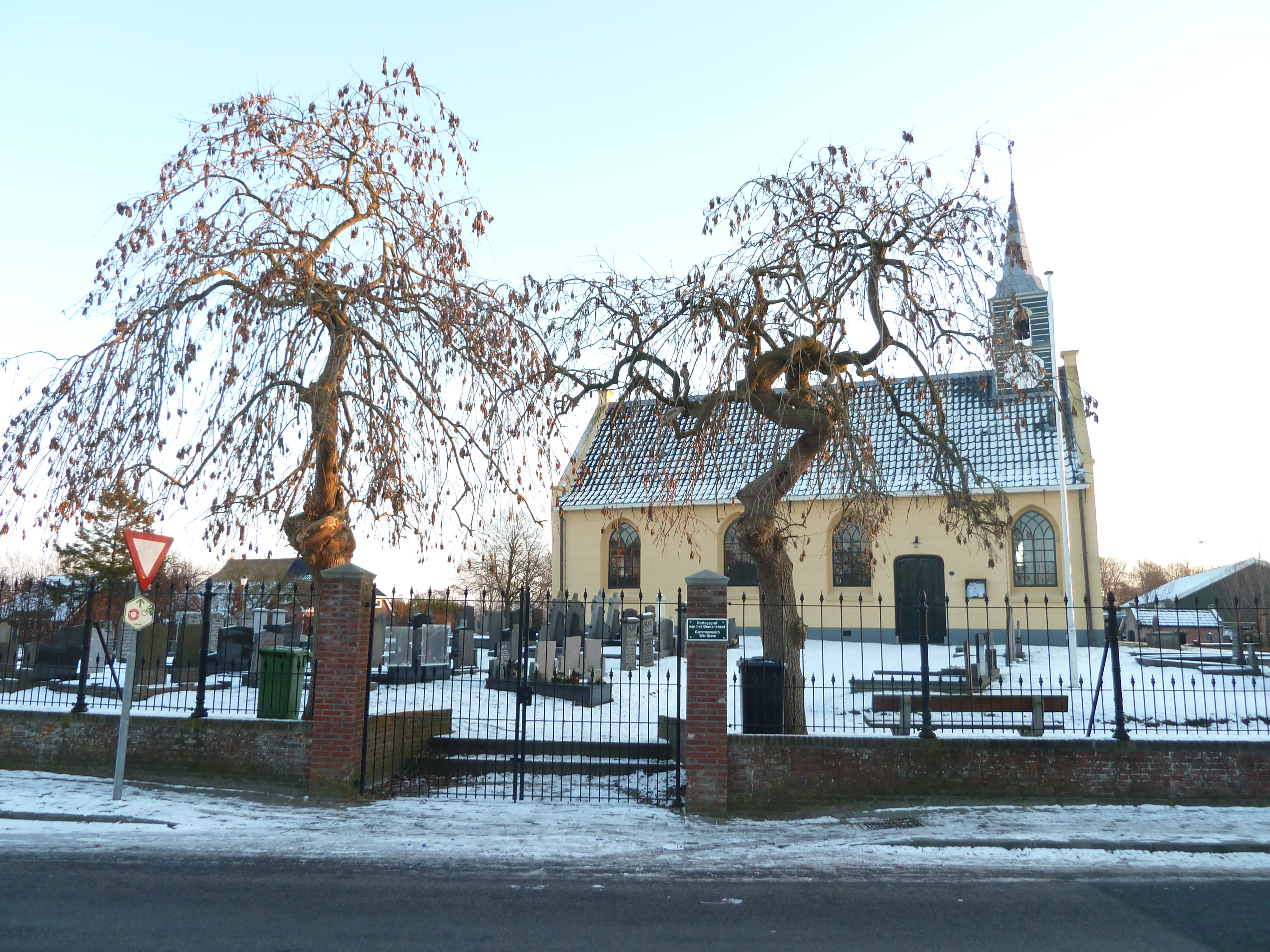 Hervormde kerk van Noordwijk (Groningen, Nederland)